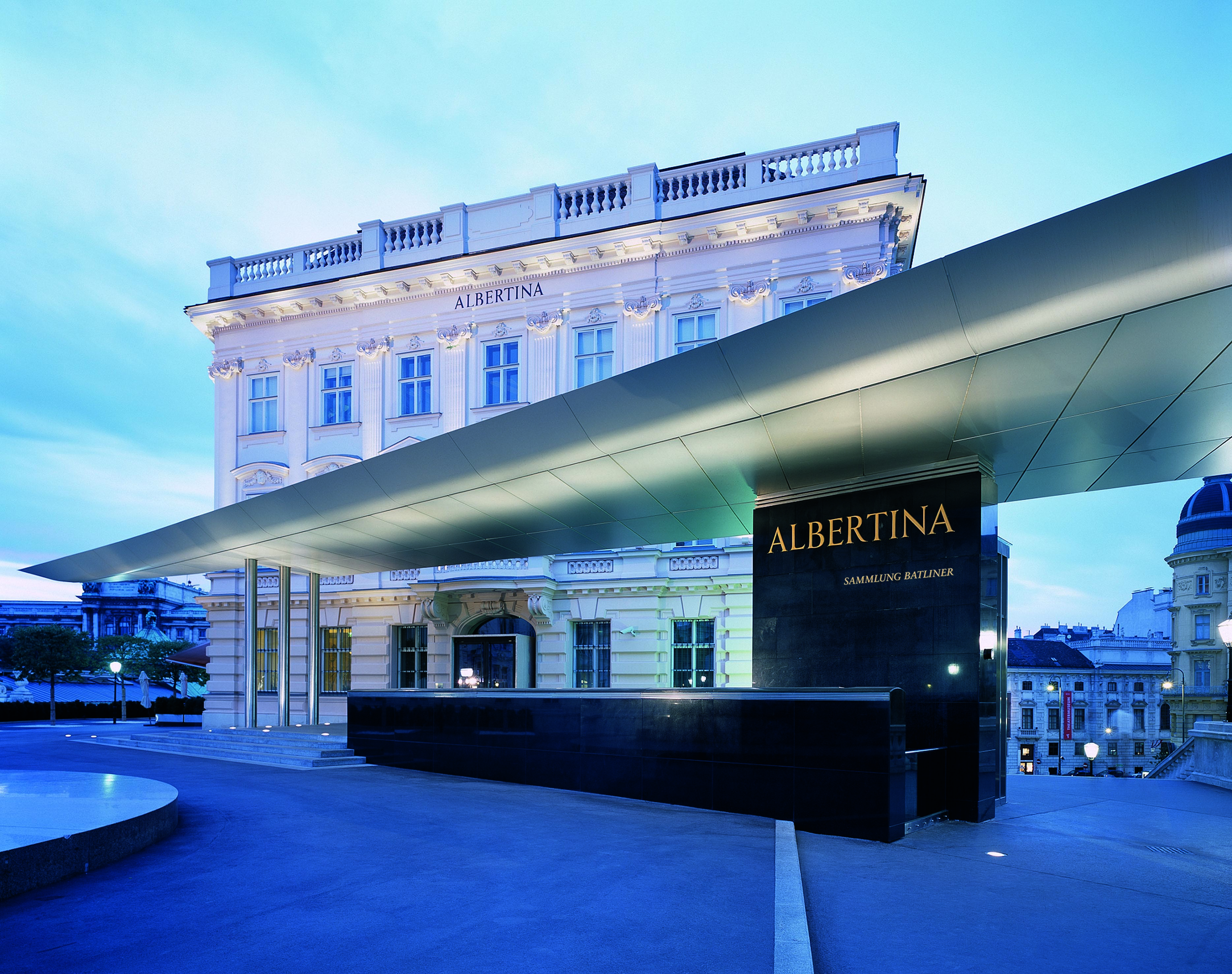 Außenansicht der Albertina mit Soravia Wing © Harald Eisenberger